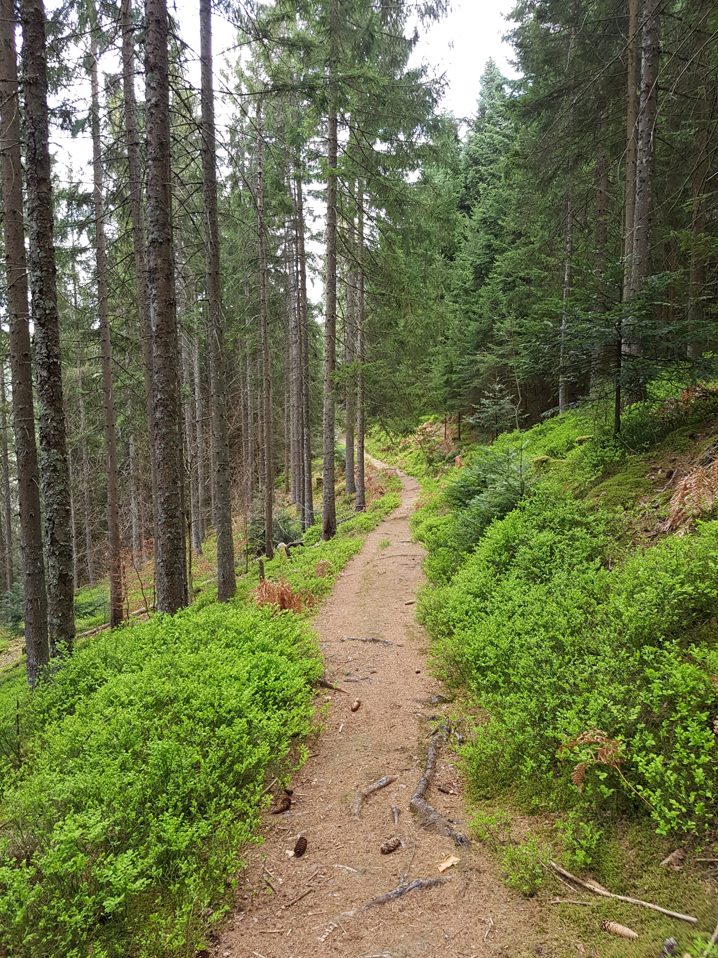 Ein Stück des Fautsburg Rundwanderweges / historischen Rundwanderweges Fautsburg. Rund um Bad Wildbadsbergorte finden sich malerische Wanderpfade.